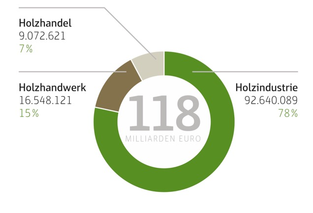 Quelle: AGR 2014, verändert nach Becher G. (2014) Clusterstatistik Forst und Holz: Tabellen für das Bundesgebiet und die Länder 2000 bis 2012. Hamburg: Johann Heinrich von Thünen-Institut, 105 p, Thünen Working Paper 32